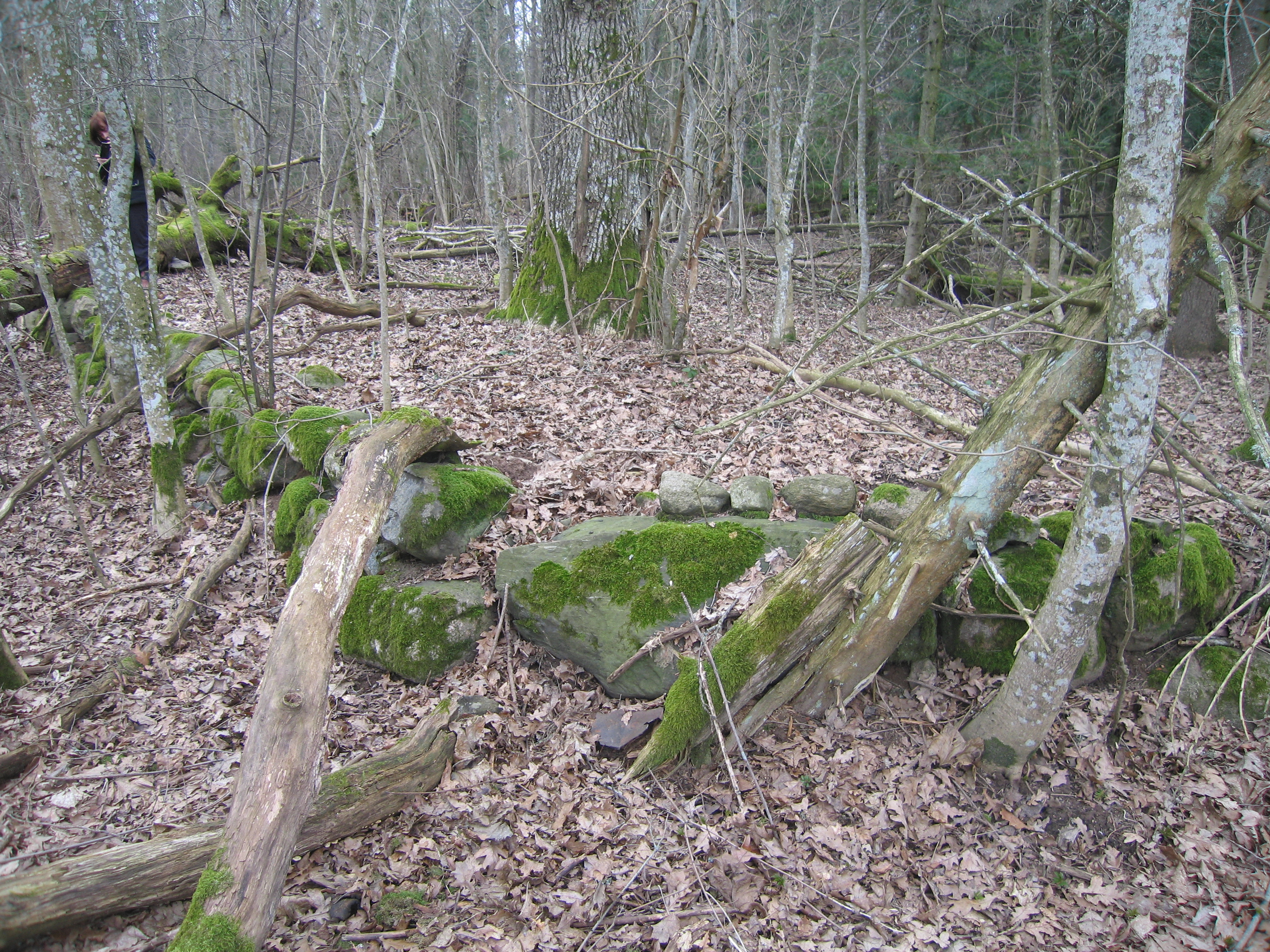 Kalmistu lõunaosa piirdemüür